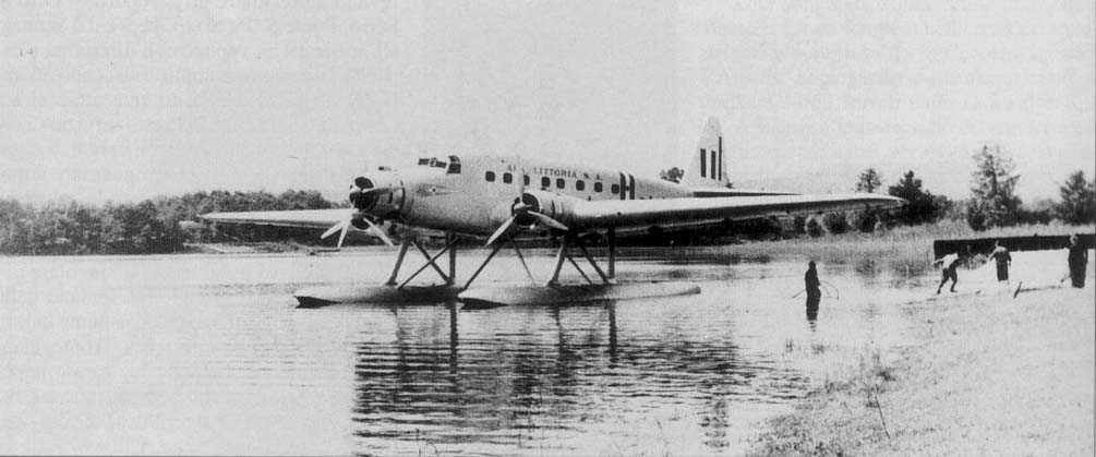 Savoia Marchetti SM.87 idro